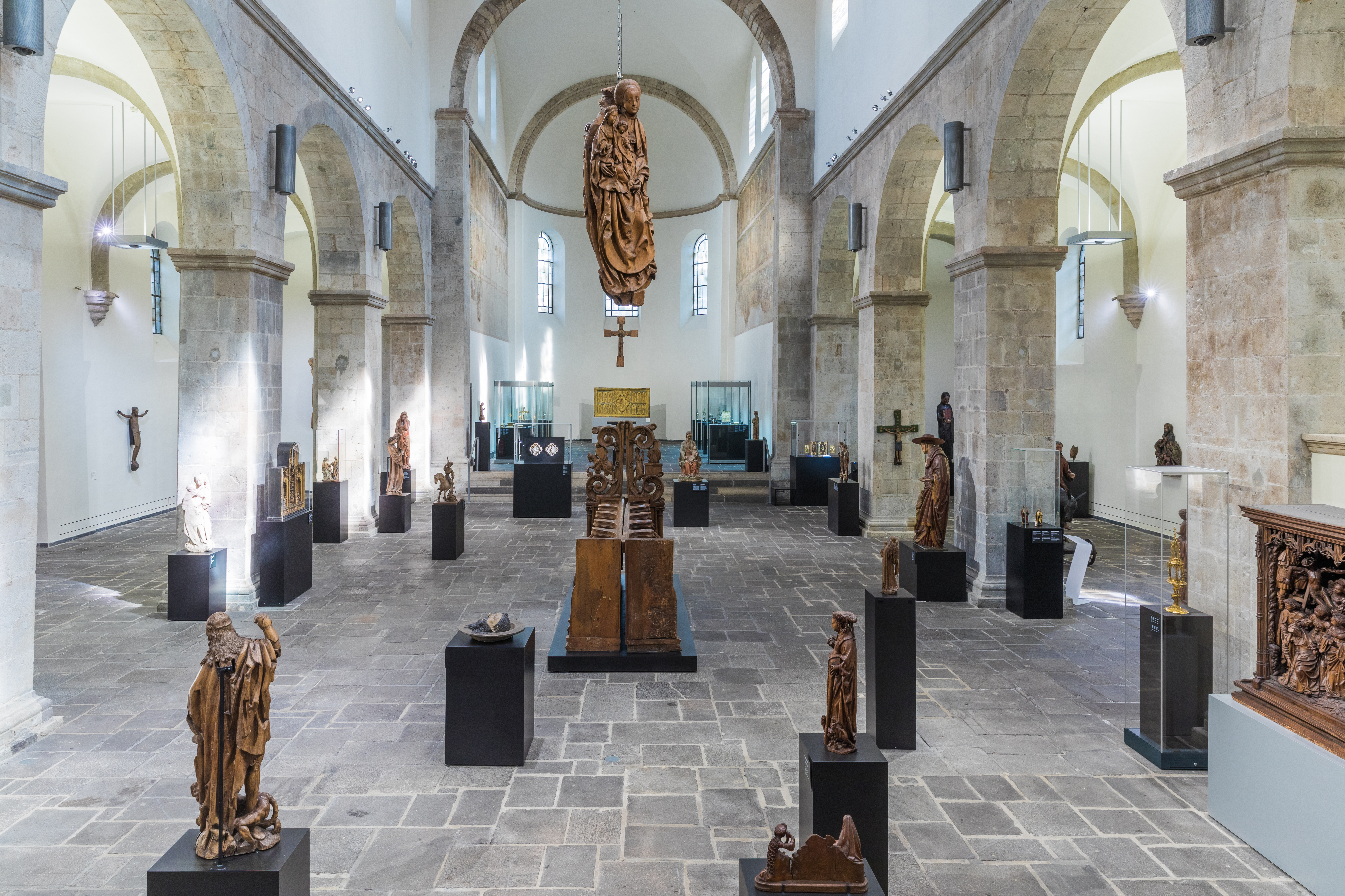 Museum Schnütgen, Köln - Innen